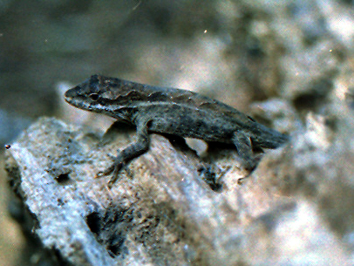 Norops crassulus